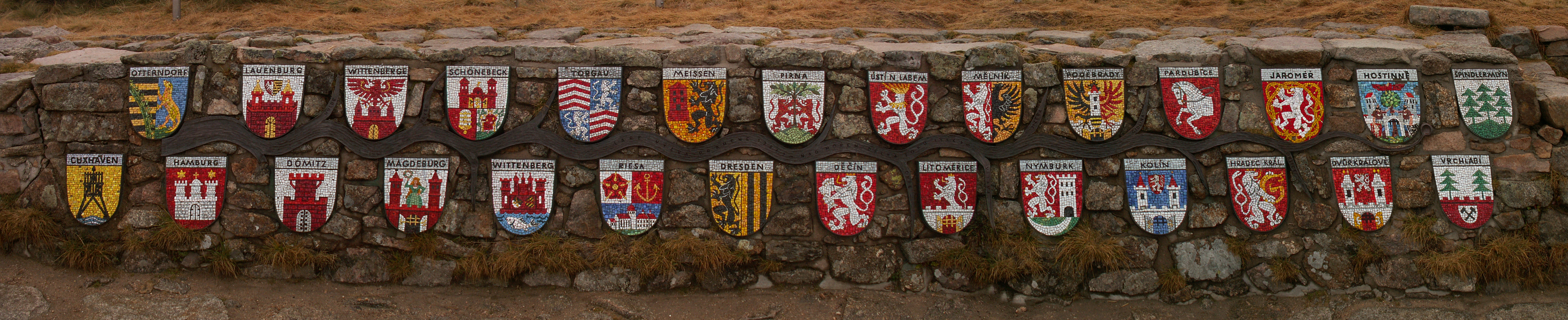 Zeď s erby všech měst, kterými Labe protéká, umístěná u pramene Labe